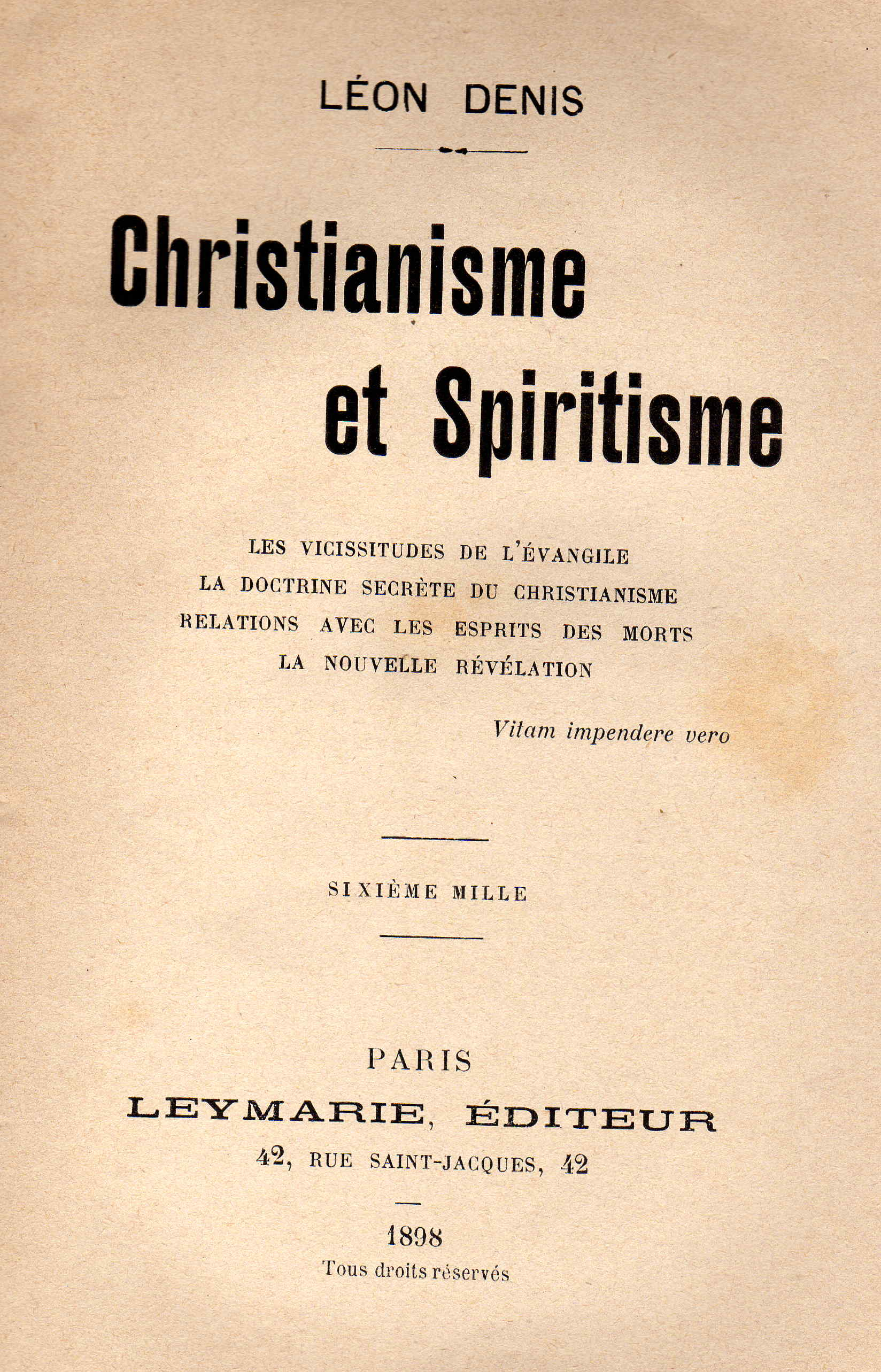 Page de garde du Livre de Léon Denis "Christianisme et Spiritisme". Edition de 1898.